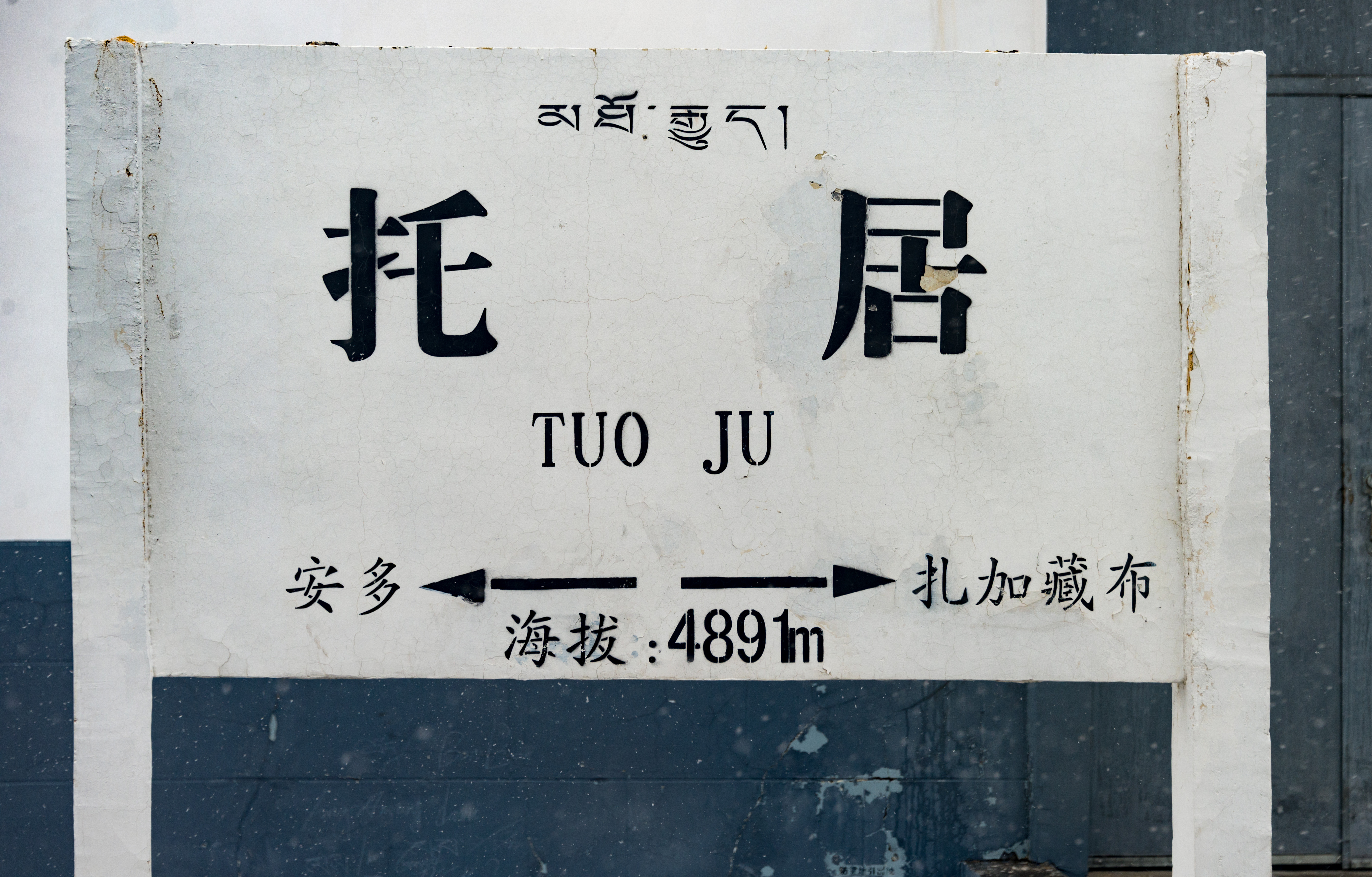 60650-Lhasa-Tibet-Qinghai-Railway